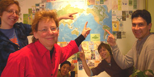 green map staff